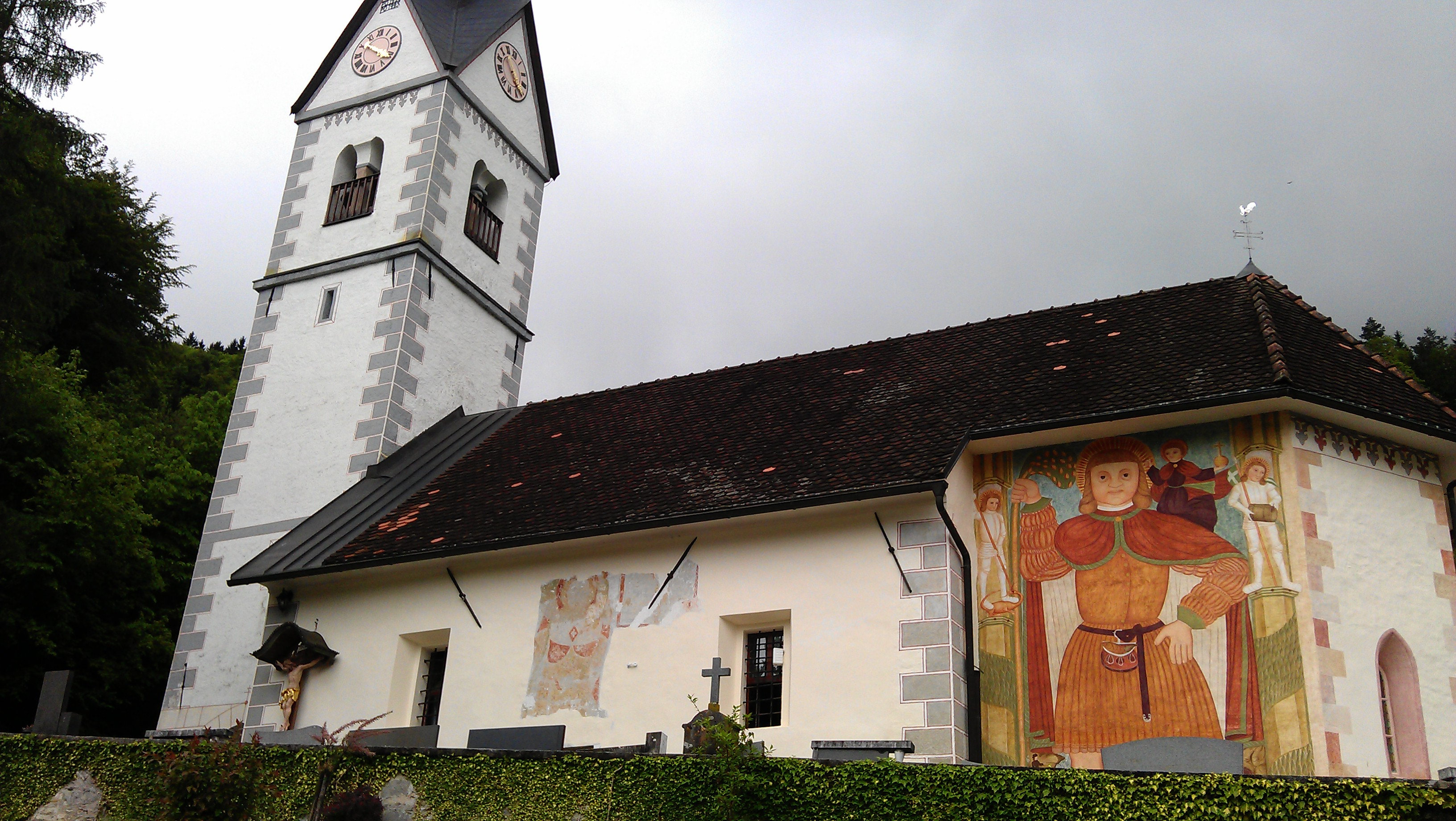 Cerkev Svetega Kancijana na Vrzdencu